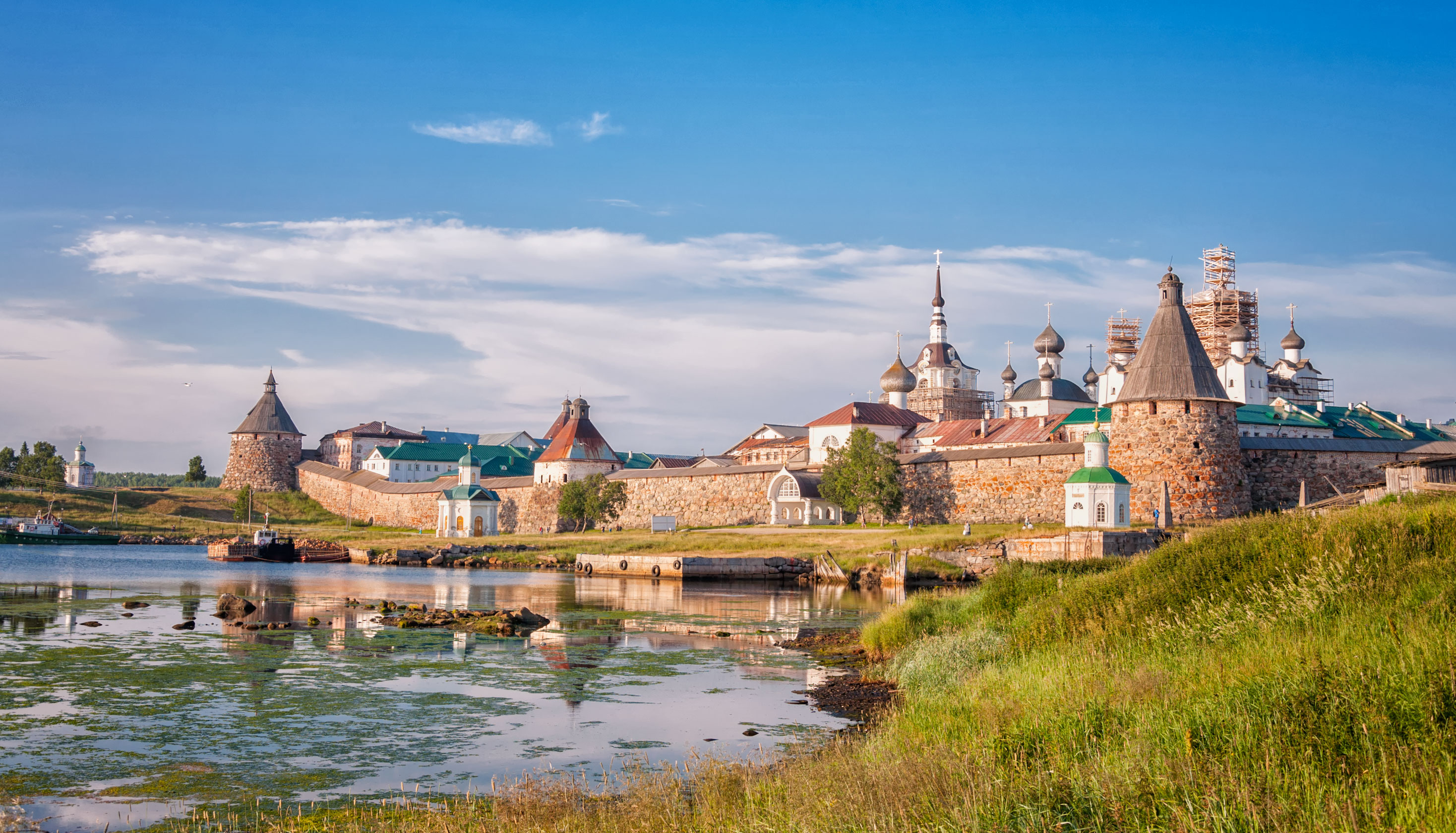 Историко-культурный комплекс Соловецких островов (Соловецкие острова)